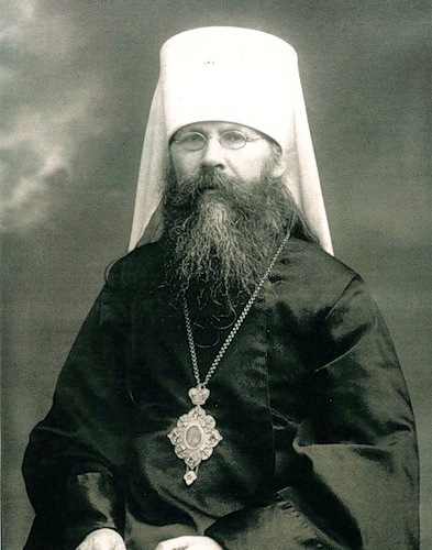 Сщмч. Вениамин (Казанский), митр. Петрогрнадский. Фотография начала 20-х гг. XX в.